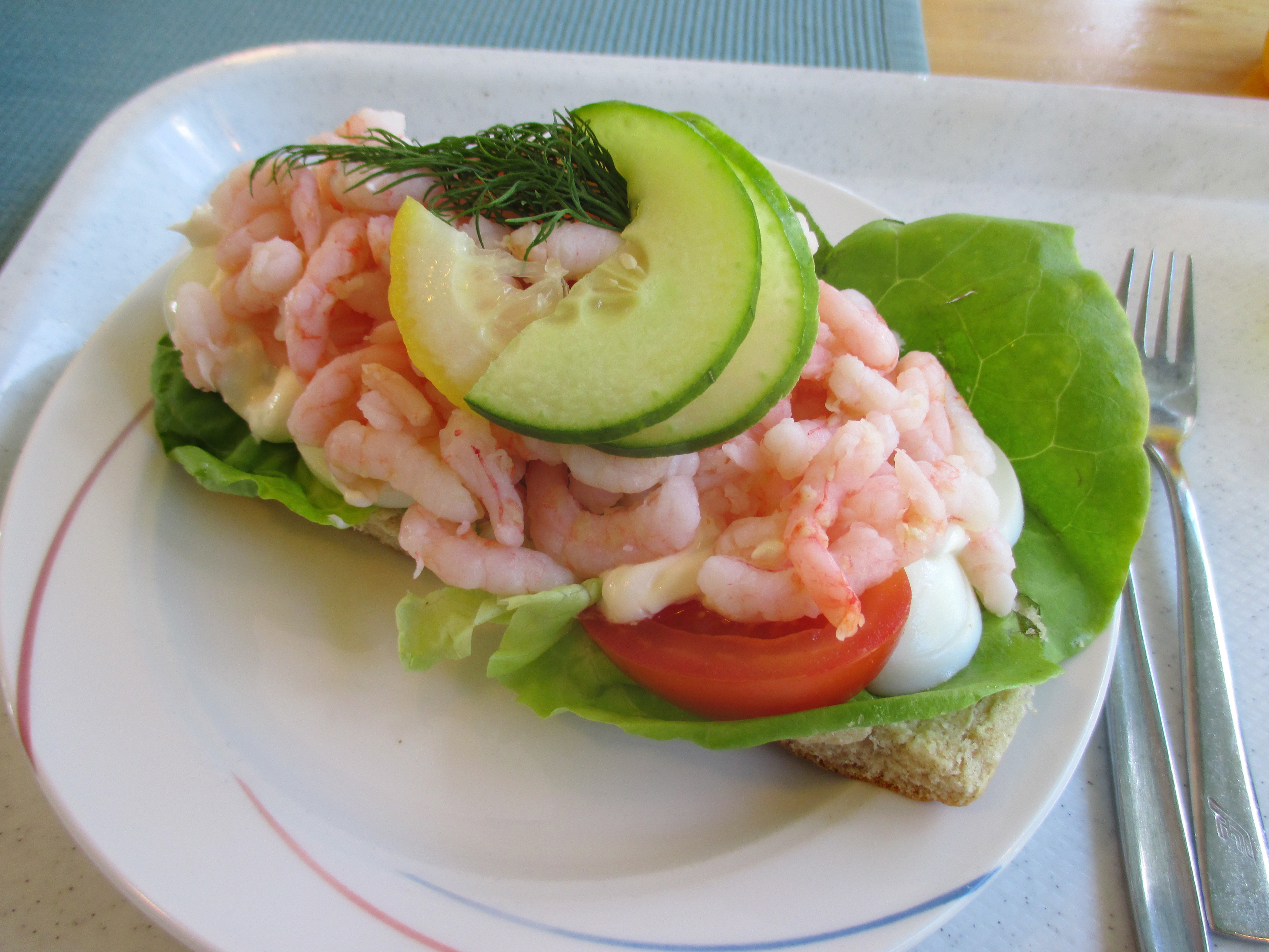 En stor räksmörgås på en tallrik på Mössebergsgården i Falköping, f.d. Skaraborgs län, Västergötland, Västra Götalands län, Sverige. Mössebergsgården har varit kända för sina räksmörgåsar åtminstone sedan tidigt 1980-tal.